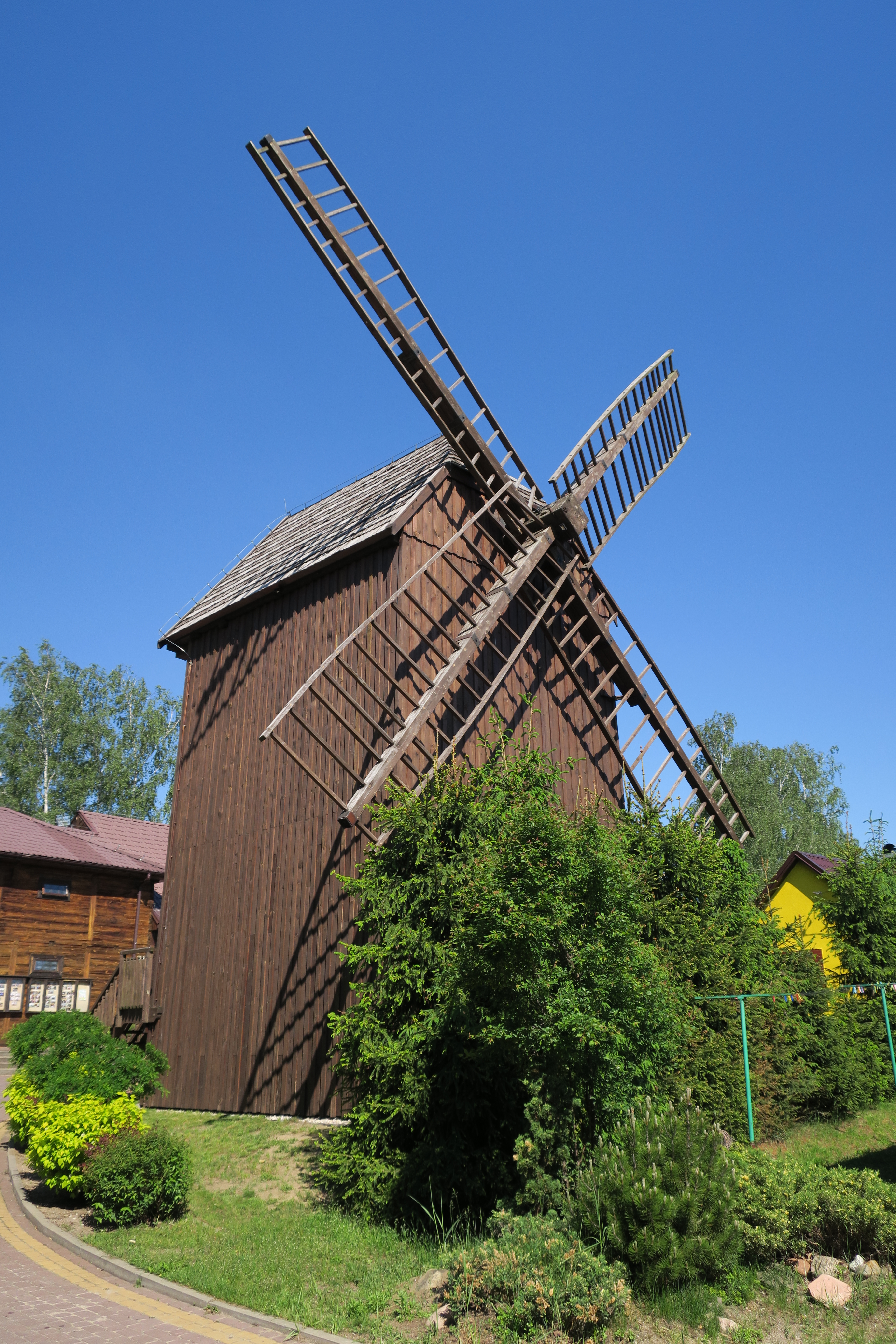 Odrestaurowany drewniany wiatrak w Turośli.